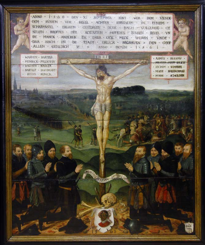 MuuseumikogukunstikoguOlemusmaalOriginaaloriginaalSäilivusrahuldavEraldatavad osadTehnika õli Materjal puit Värvus mitmevärviline Mõõdud kõrgus: 120 cm; laius: 99.7 cm1561 - 1561 valmistamine autorlus oletatav autor: Glandorp, Lambert endine nimetus Glandorf (Glandrop), Lambert